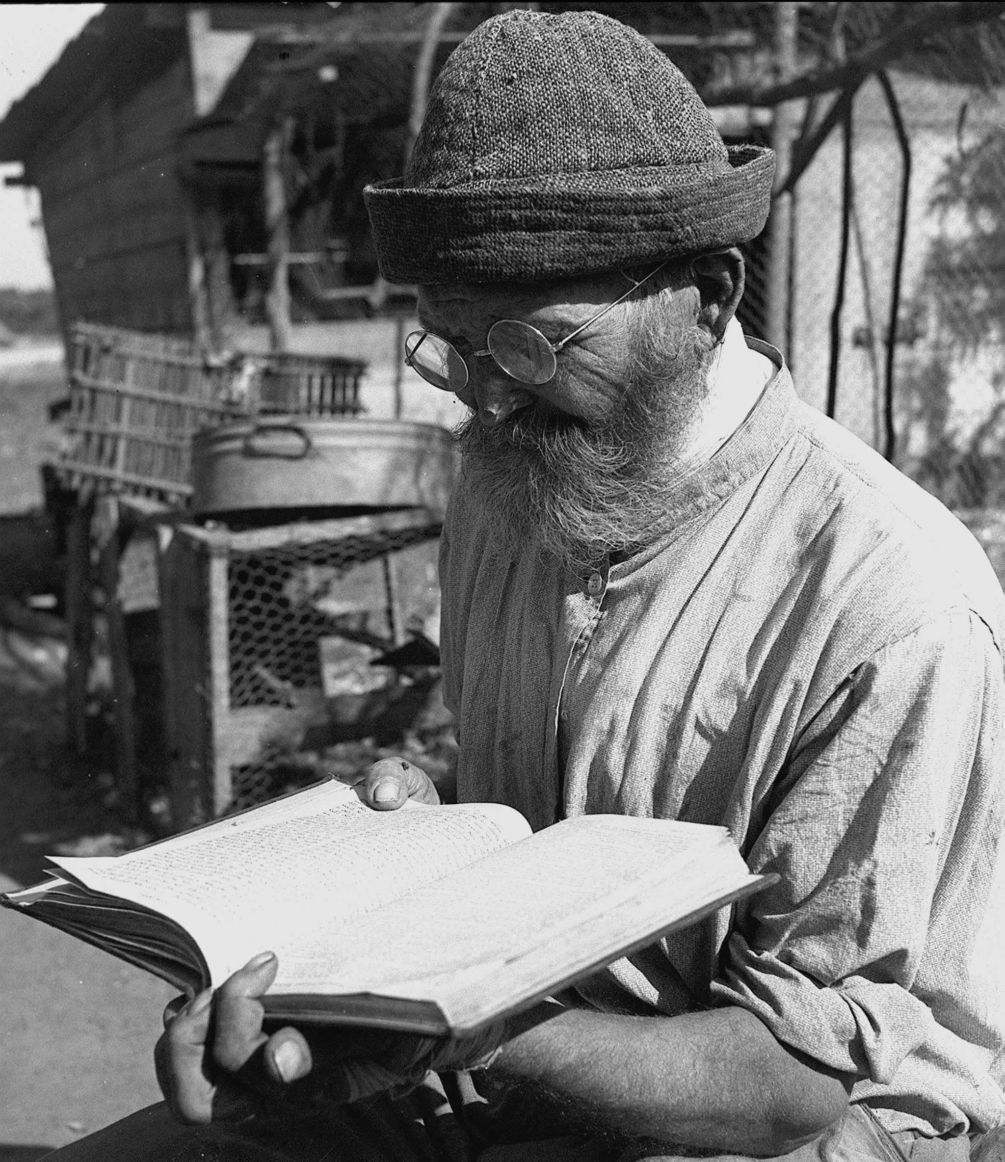 A Russian convert to Judaism studies the bible at his farm in Nahalat Yitzhak, Tel Aviv. עולה מברית המועצות שהמיר את דתו ליהדות, קורא בתנך בנחלת יצחק בתל אביב